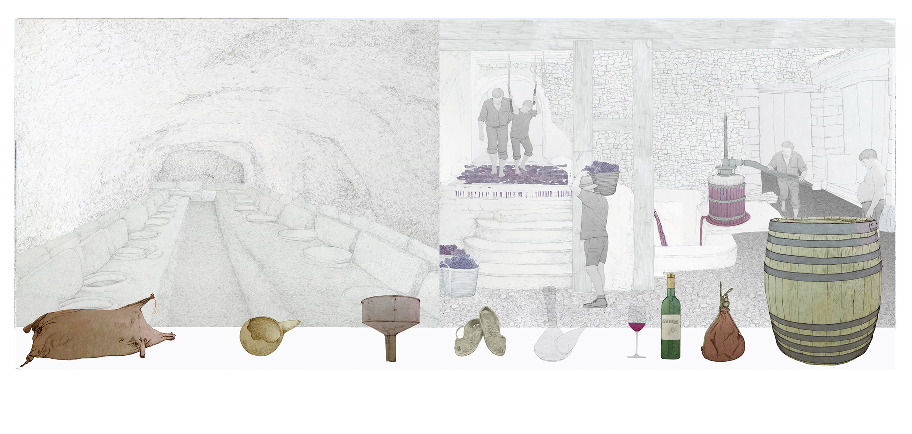 Il·lustracions d'Andrés Marín Jarque per a l'exposició permanent "Secà i Muntanya" del Museu Valencià d'Etnologia. S'il·lustren els escenaris del medi rural i el procés (treball) mitjançant el qual s'aprofita este espai.